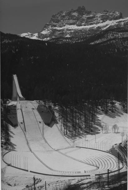 Trampolino Italia alle Olimpiadi di Cortina 1956